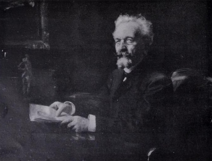 Portrait de E. Flammarion.